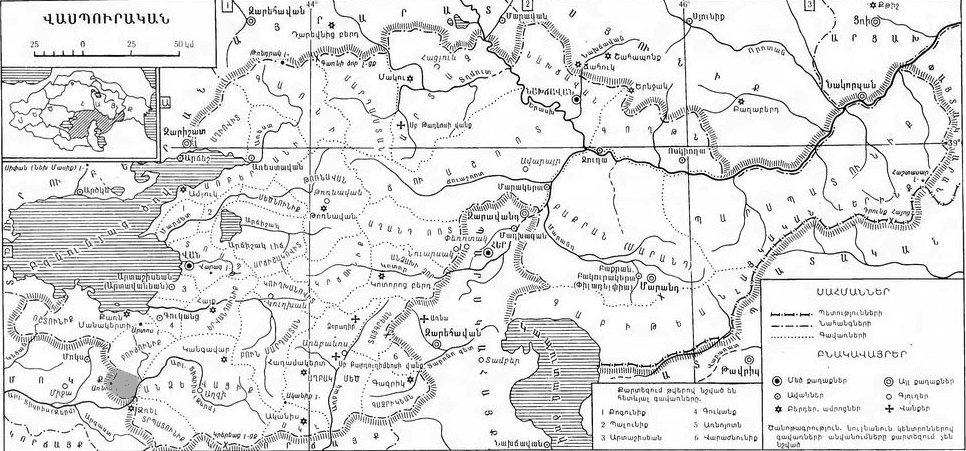 Վասպուրական